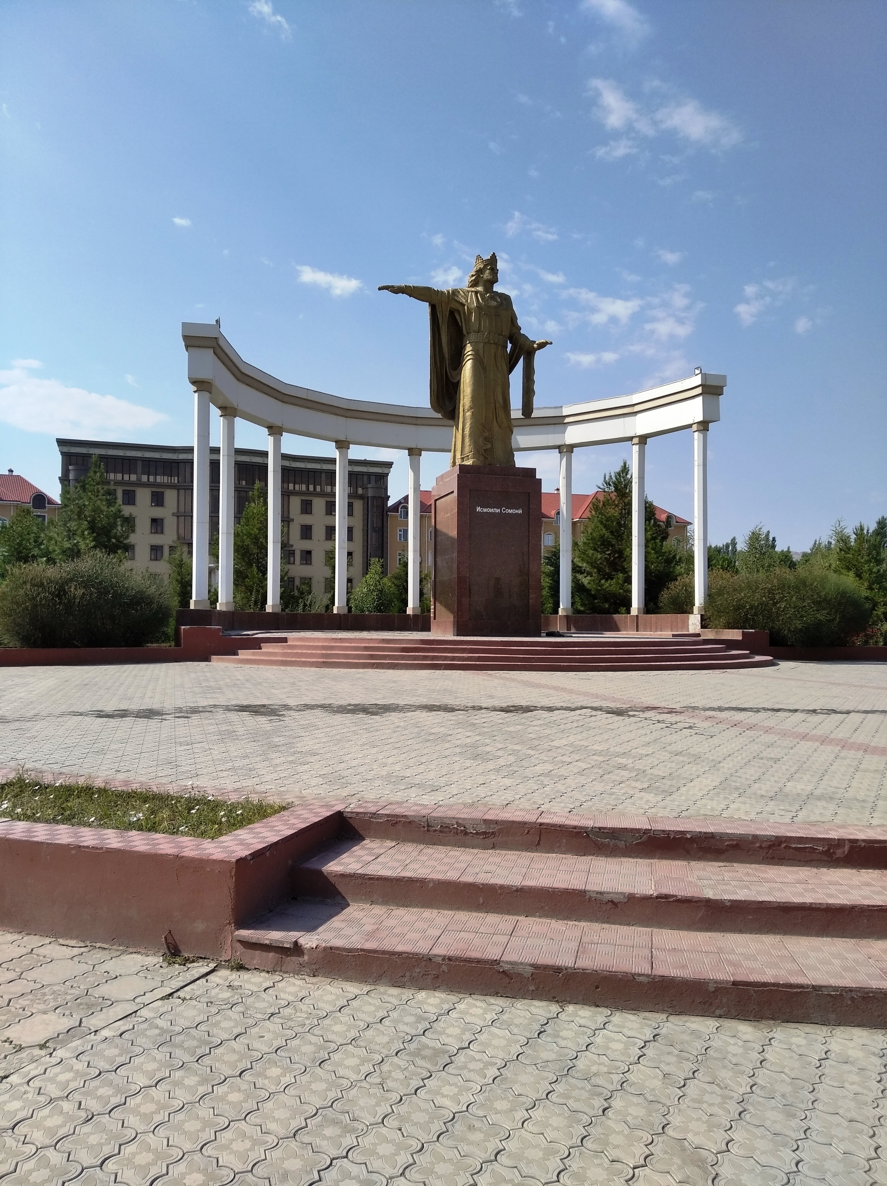 Тоҷикӣ: Муҷассамаи Исмоили Сомонӣ дар ш. Исфара